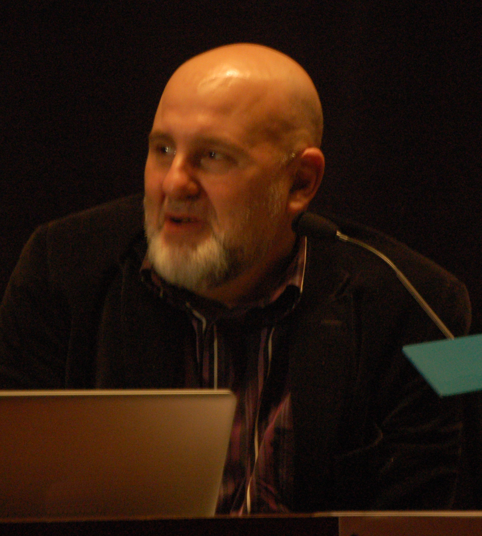 Antón Reixa no I Simposio Internacional Ecolingua